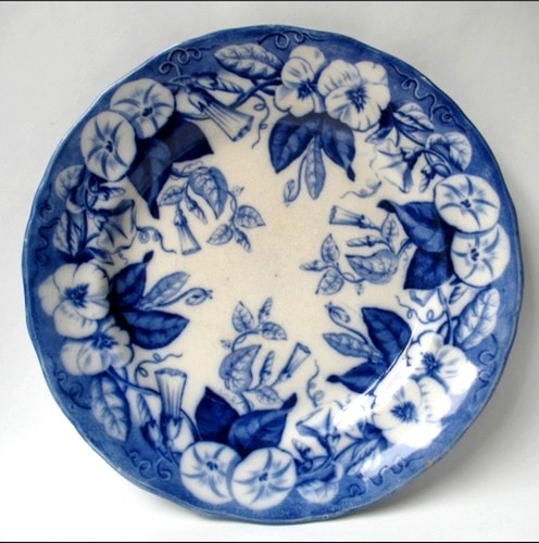 Assiette à décor Volubilis - Vieillard, vers 1850, France